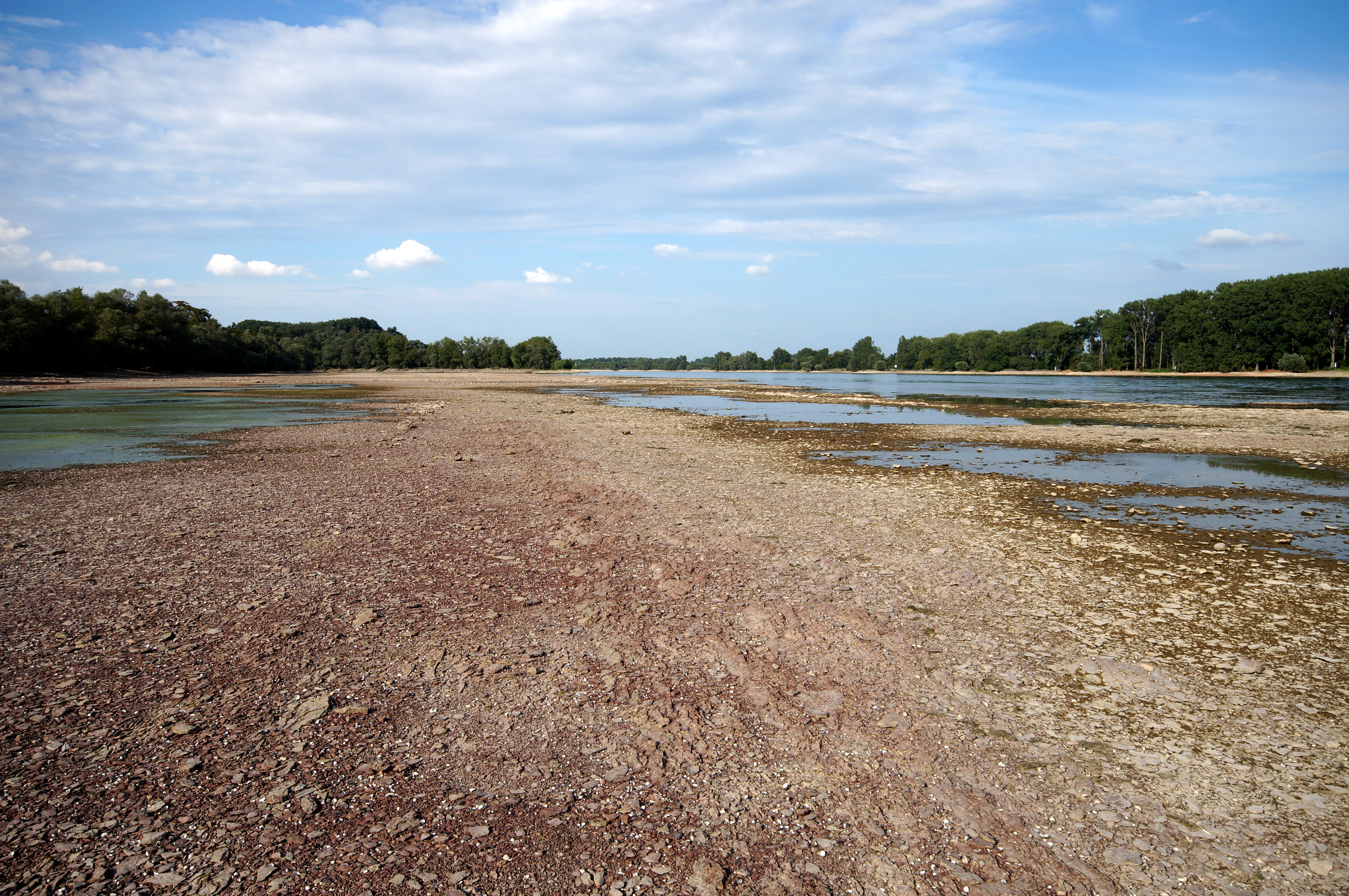 Folgen der Austrocknung des Oberrheins zwischen Nackenheim und Nierstein bei Mainz in Rheinhessen infolge der Hitzewelle in Europa im Sommer 2015